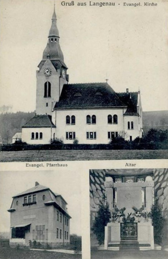 Evangelický kostel v Prostředním Lánově, fara, oltář.